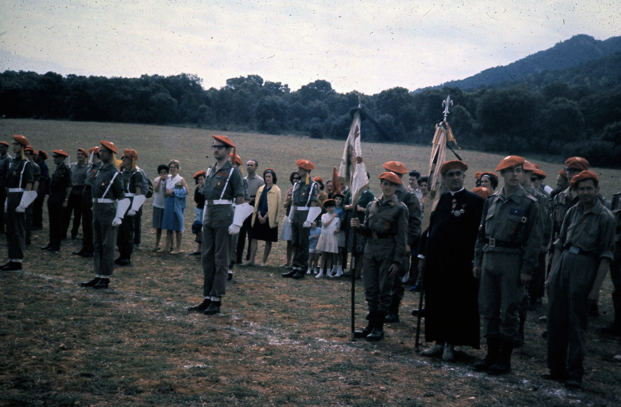 Requetés en Montejurra